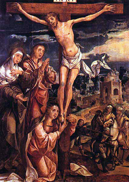 Calvário, óleo sobre madeira, 122 x 88 cm. Misericórdia de Abrantes. Abrantes, Portugal